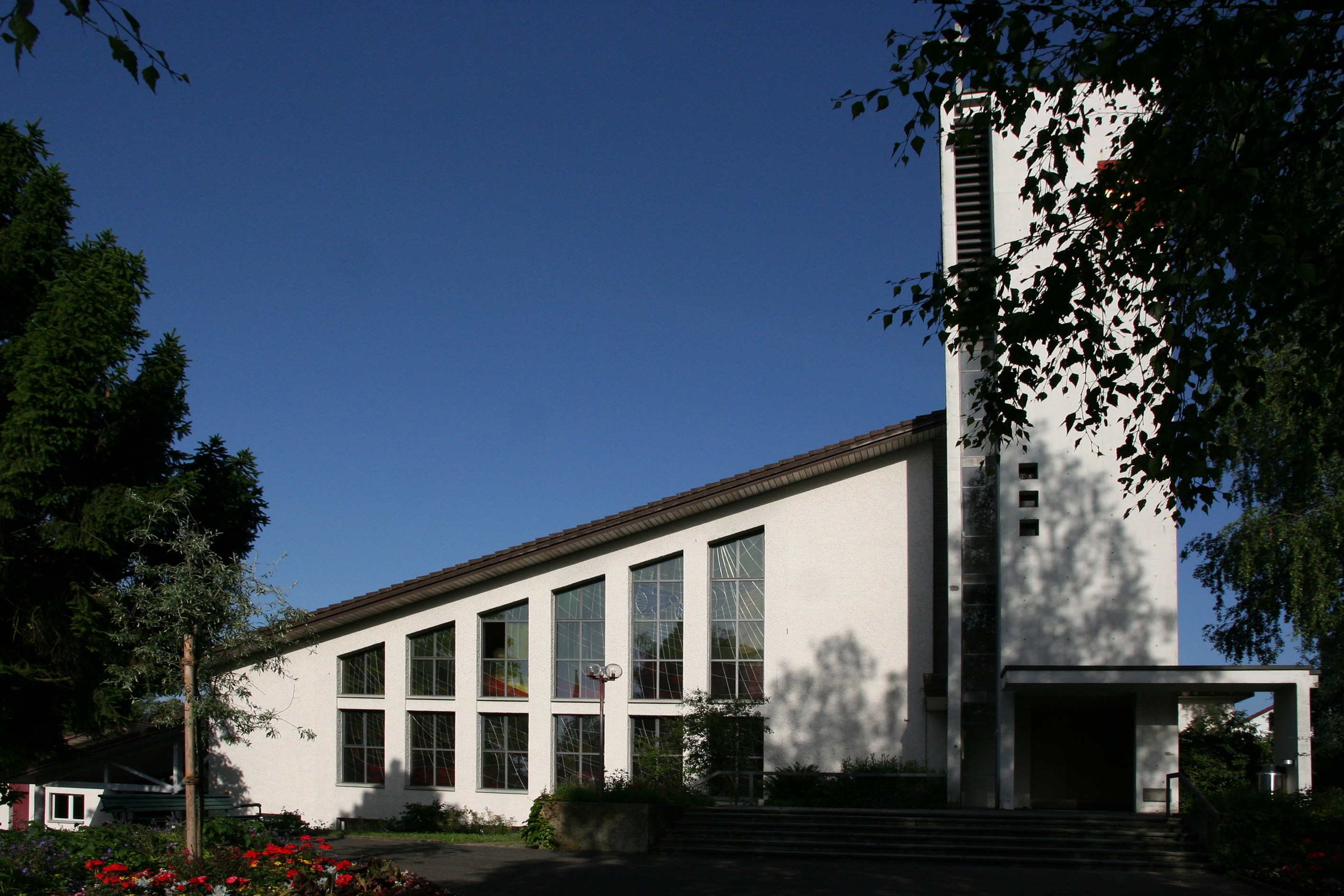 Römisch-katholische Kirche St. Plazidus und Sigisbert Kleinandelfingen, Aussenansicht